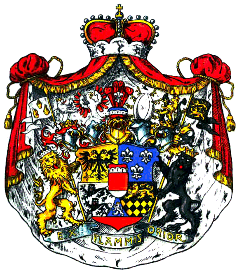 Wappen der Fürsten zu Hohenlohe-Oehringen und Herzöge von Ujest